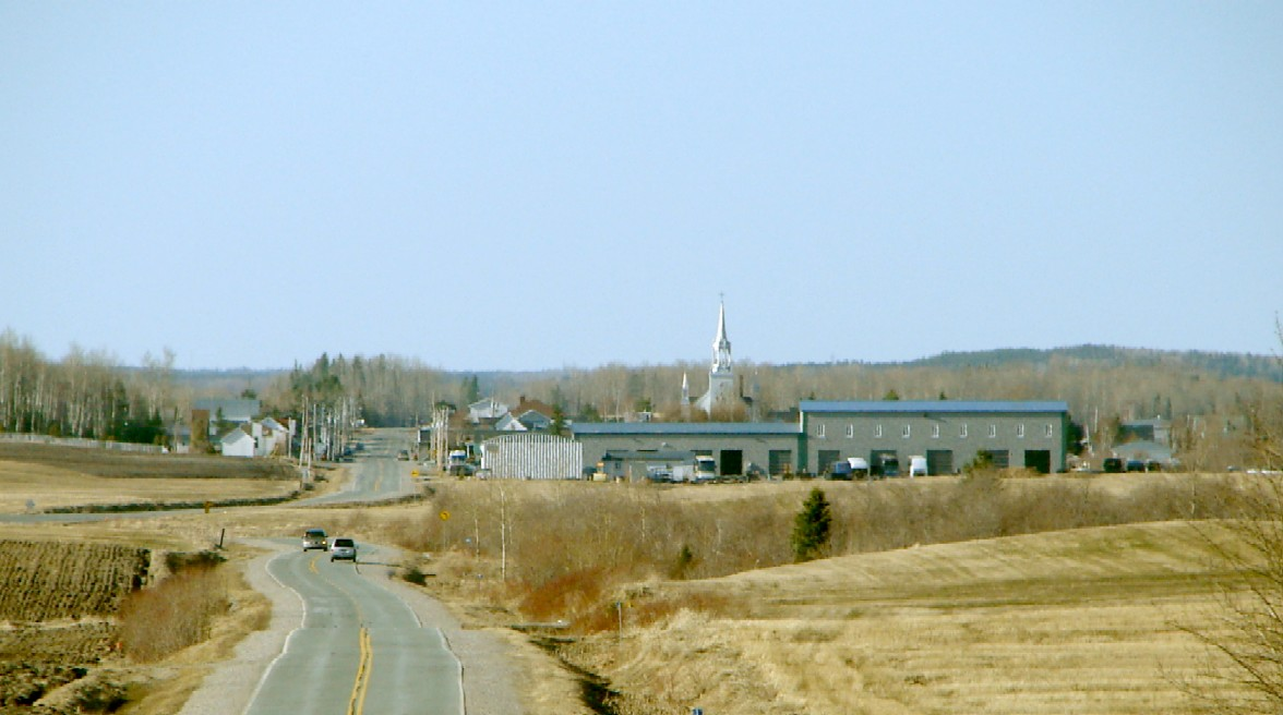 Sainte-Germaine-Boulé, Quebec, Canada